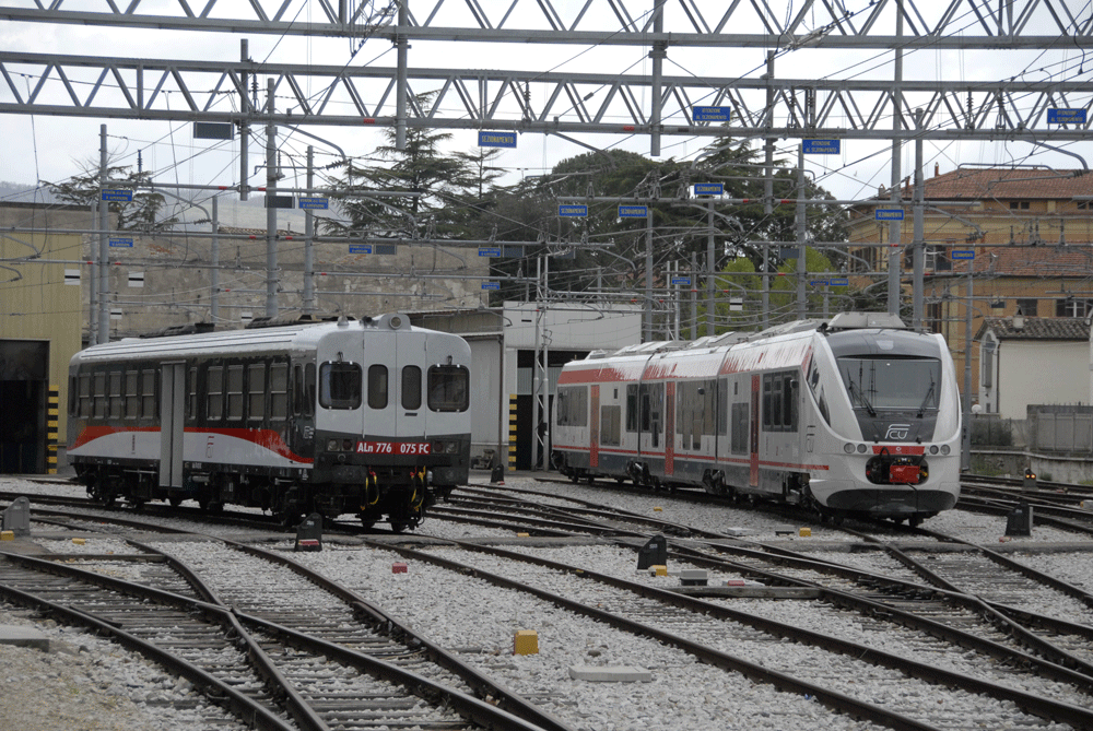 Coppia formata da un ALn 776 e Minuetto della FCU con la nuova livrea.